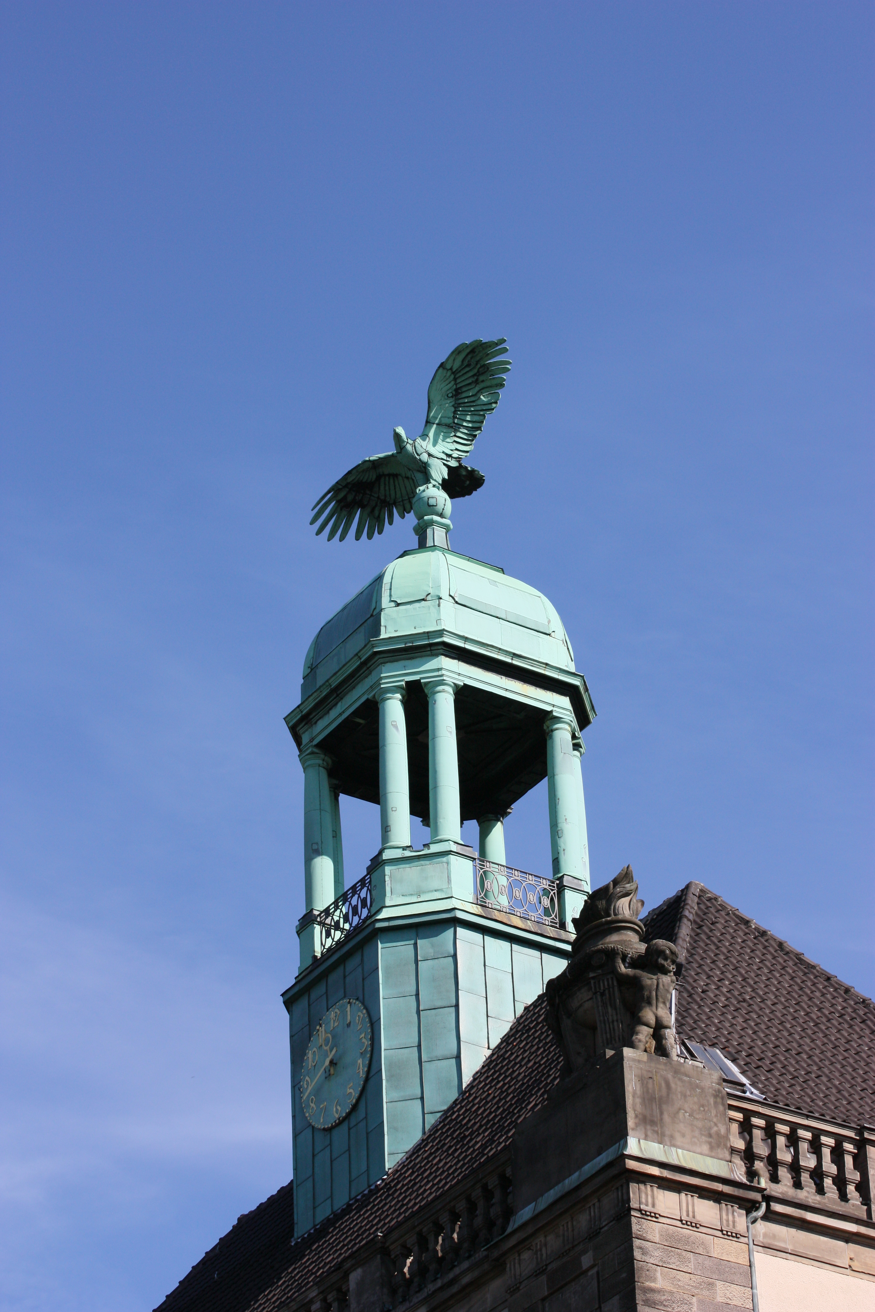 Gebäude der Bezirksregierung Düsseldorf an der Cecilienallee 1-2 mit Resalit und Preußischem Adler